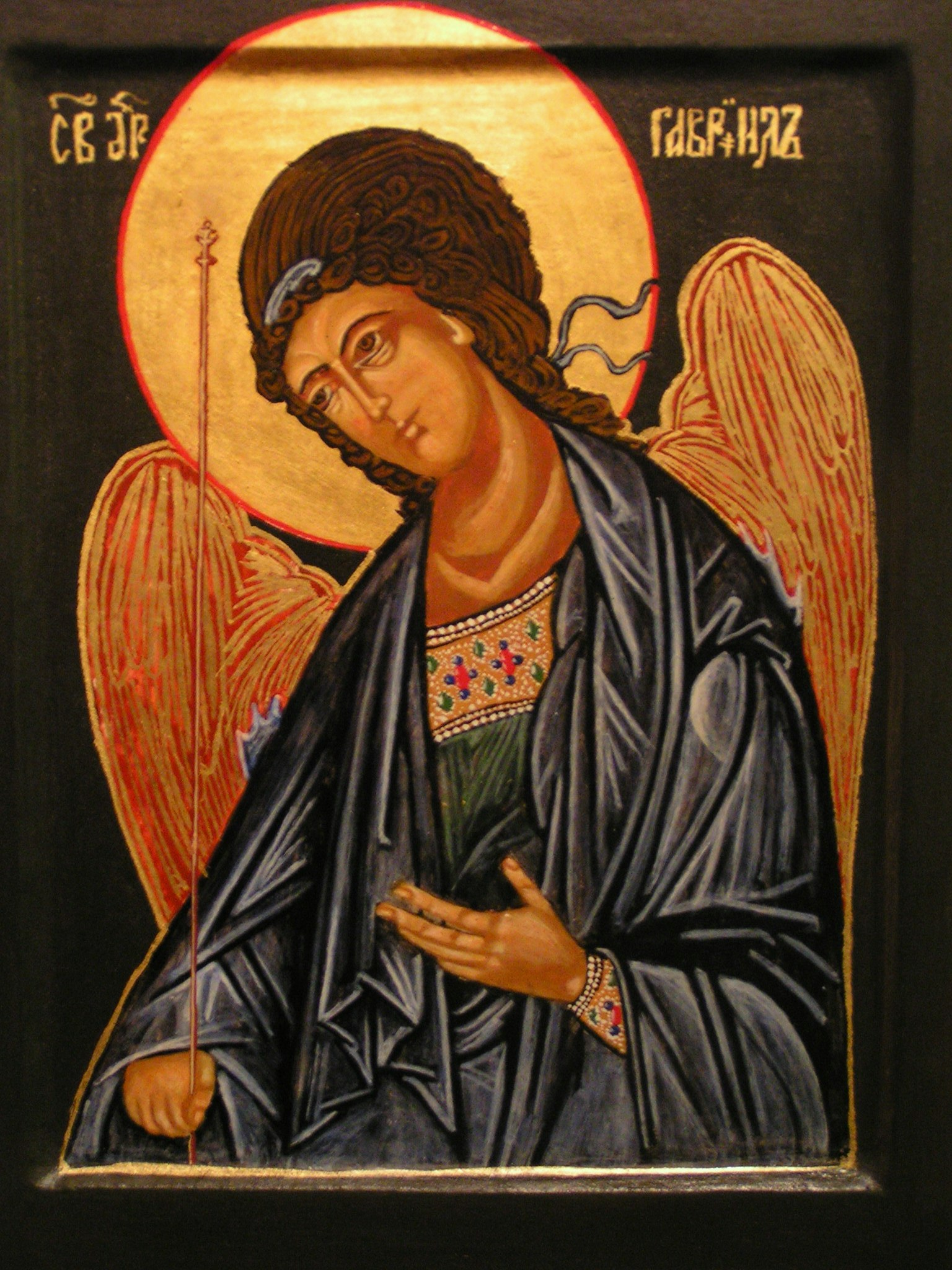 Eigen foto van zelf geschilderde ikoon.